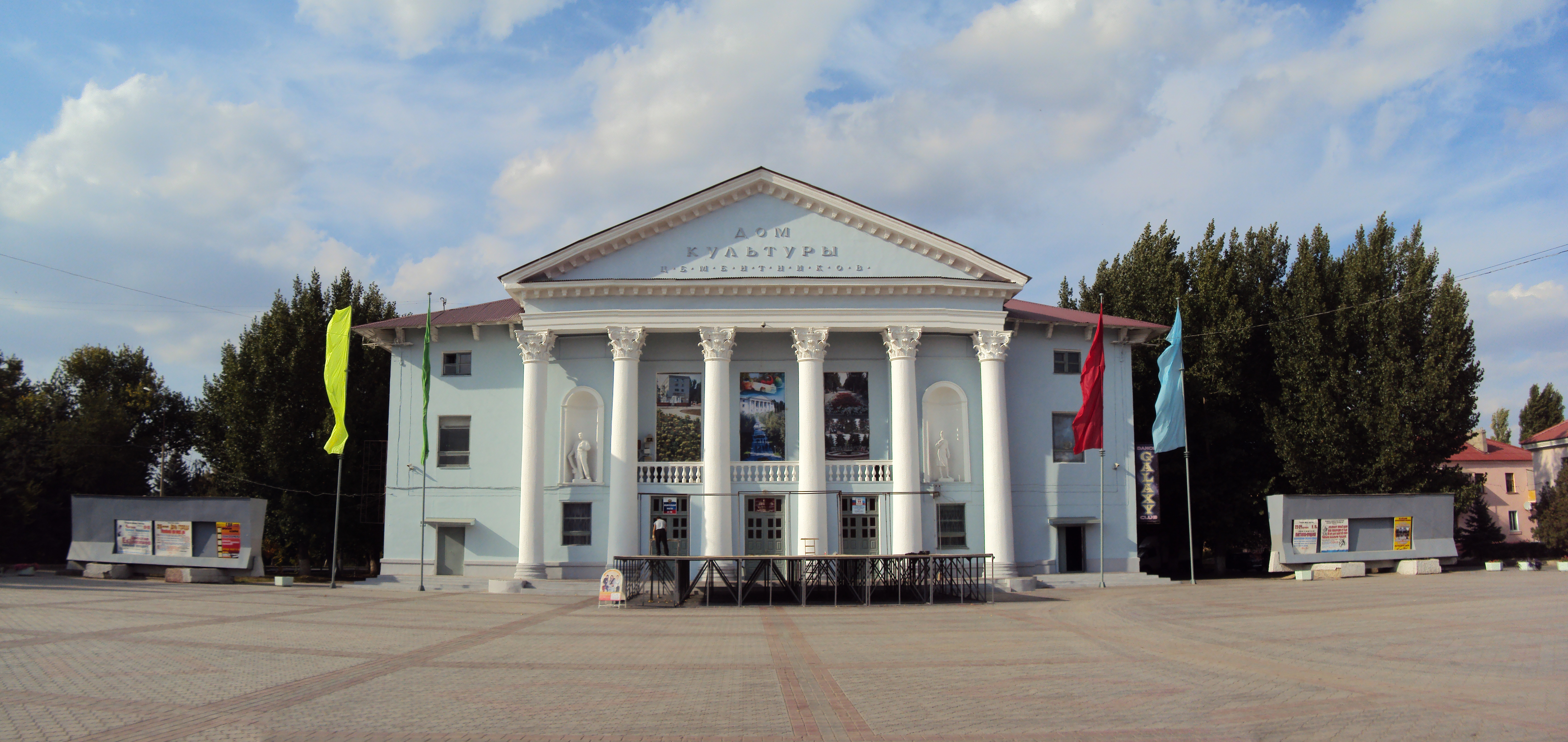 ДКЦ